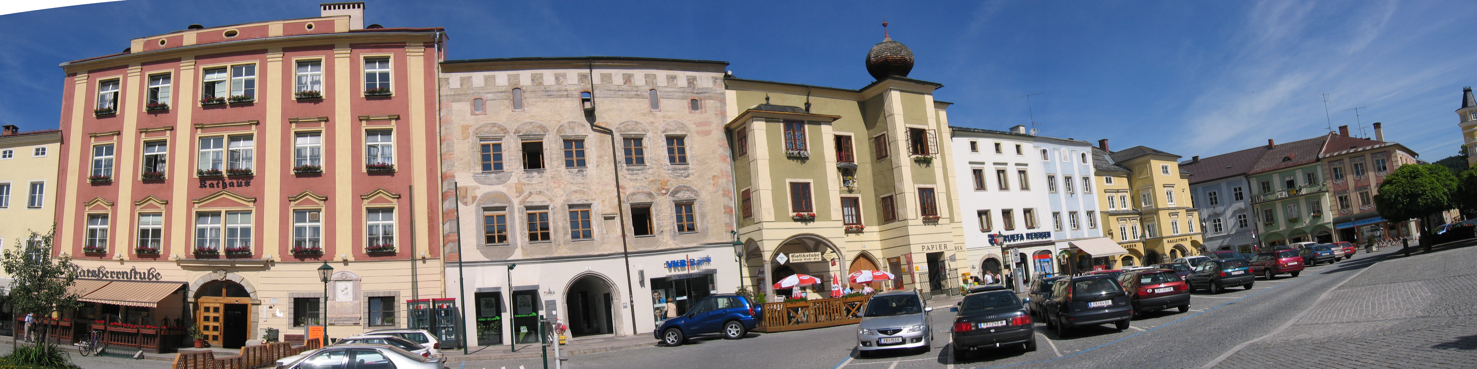 Hauptplatz in Freistadt, OÖ - Linke Seite in Richtung Böhmertor